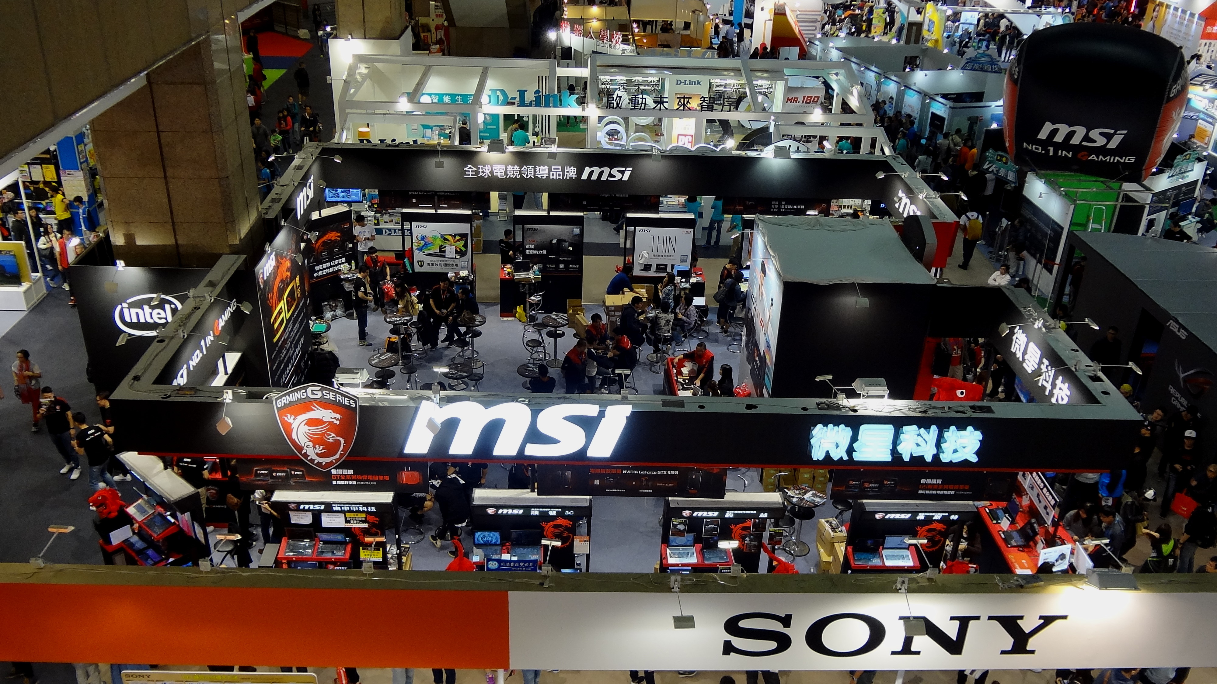 2016年台北資訊月，微星科技攤位。